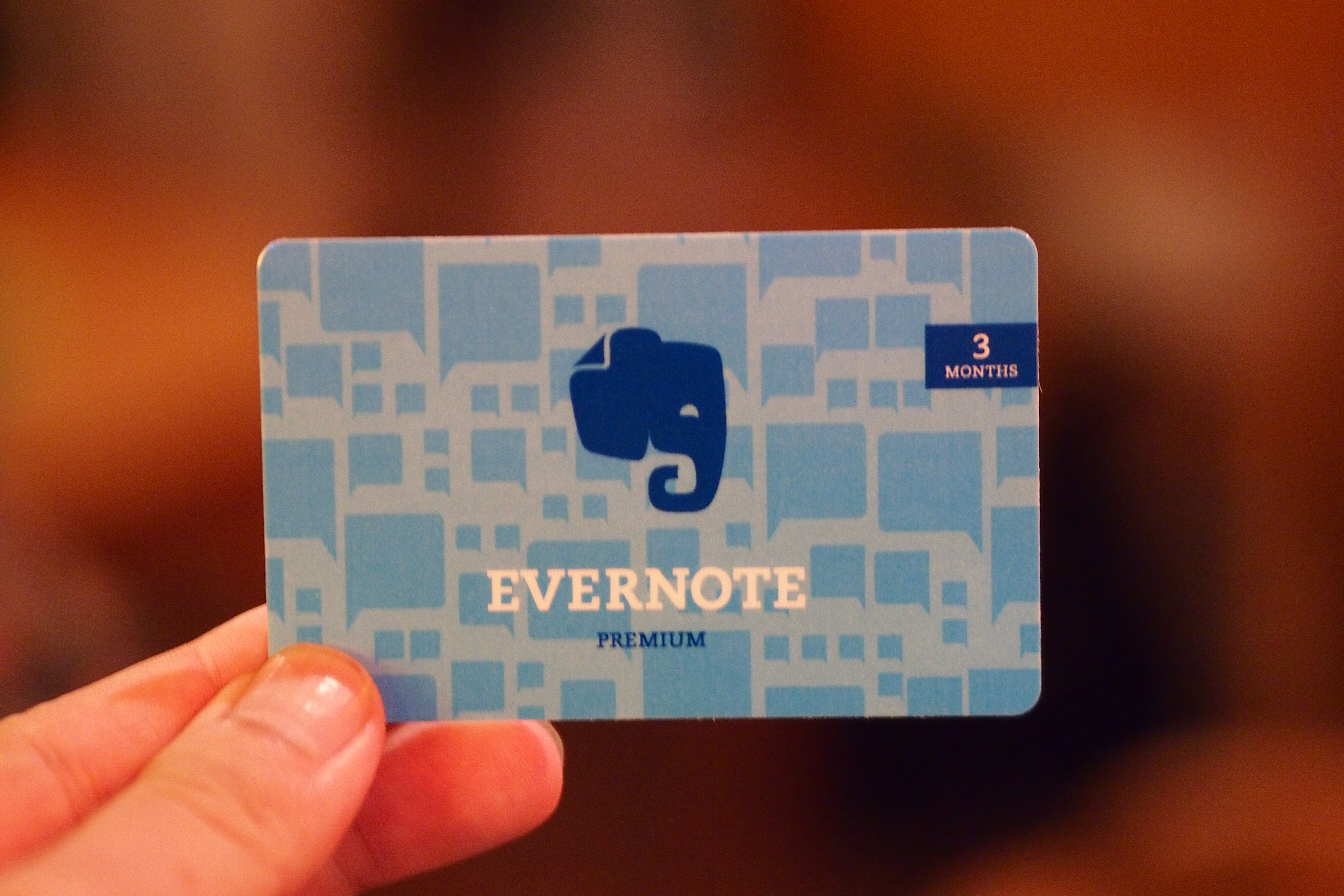 Evernote Taiwan User Meetup